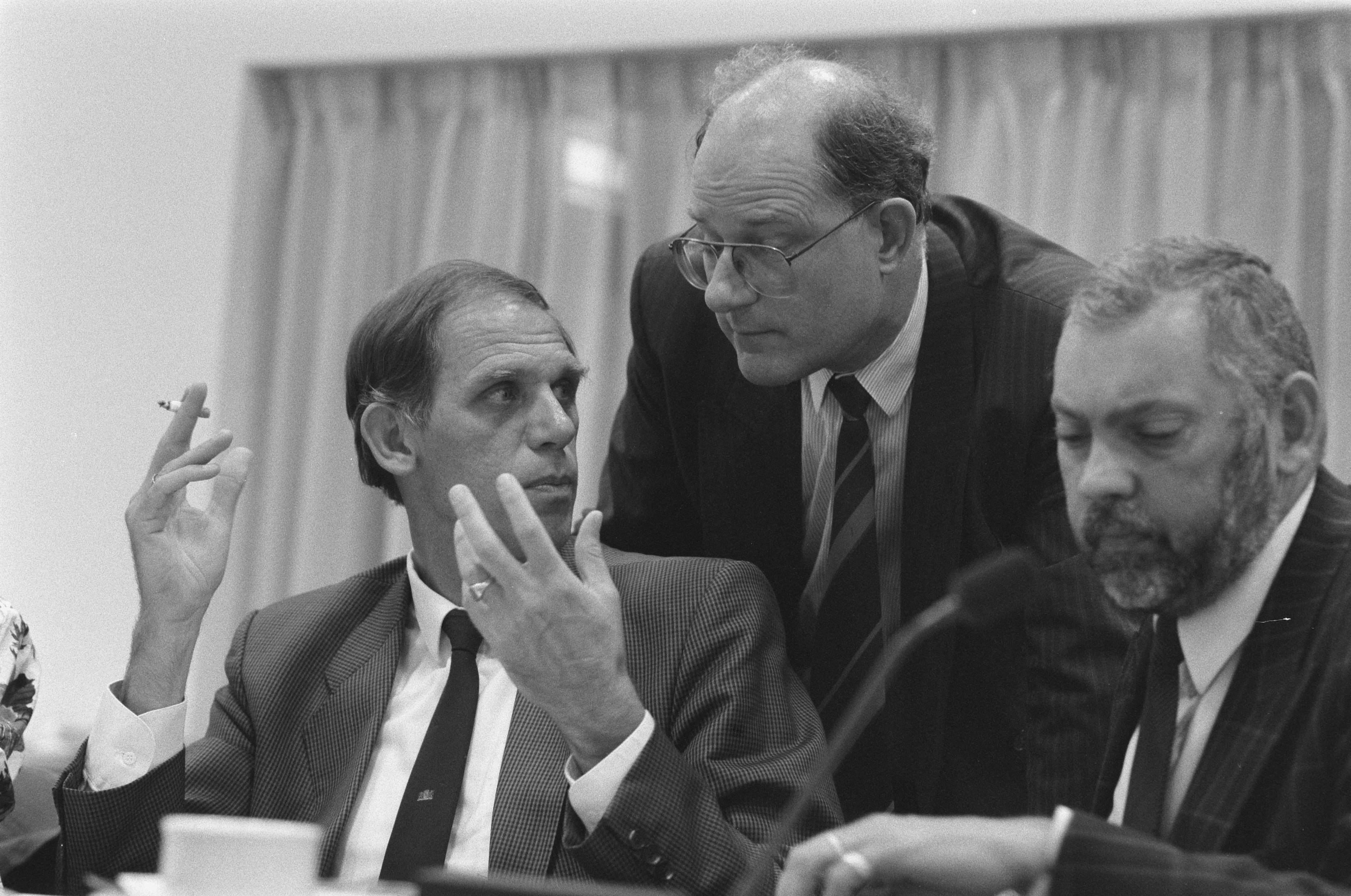 Collectie / Archief : Fotocollectie Anefo Reportage / Serie : [ onbekend ] Beschrijving : Kamercommissievergadering over politiebudget; v.l.n.r. de woordvoerders Dijkstal (VVD), Stoffelen (PvdA) en Van der Heijden (CDA) Datum : 30 mei 1988 Trefwoorden : politiek Persoonsnaam : Dijkstal Fotograaf : Fotograaf Onbekend / Anefo Auteursrechthebbende : Nationaal Archief Materiaalsoort : Negatief (zwart/wit) Nummer archiefinventaris : bekijk toegang 2.24.01.05 Bestanddeelnummer : 934-2567